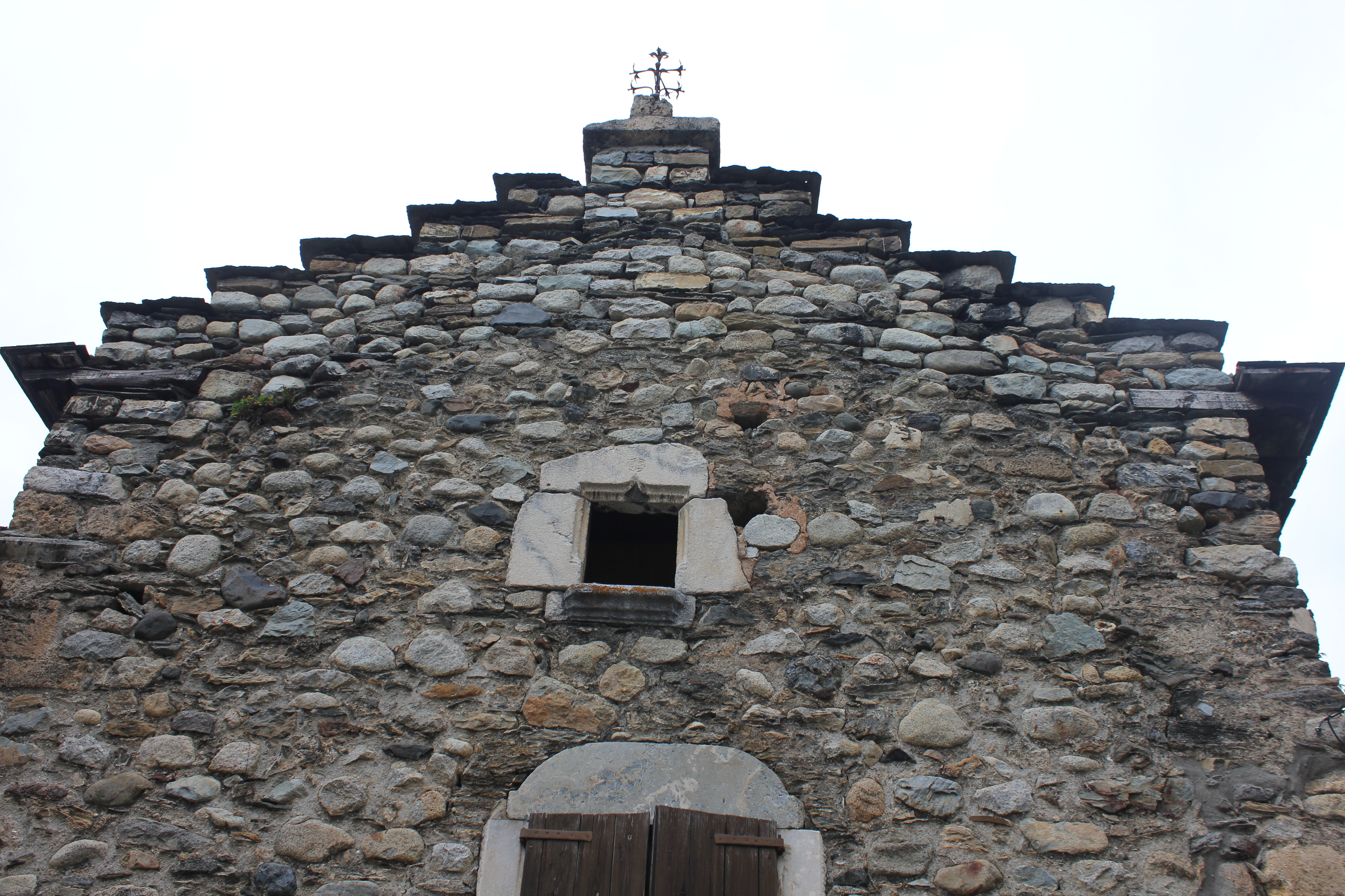 Aragonés: Un penal a Ancils (vall de Benás, Uesca).